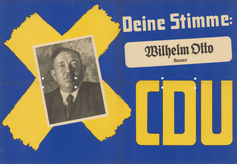 Deine Stimme: Wilhelm Otto Bauer CDU Abbildung: Porträtfoto - Stimmkreuz Plakatart: Kandidaten-/Personenplakat mit Porträt Objekt-Signatur: 10-009 : 202 Bestand: Landtagswahlplakate Nordrhein-Westfalen (10-009) GliederungBestand10-18: Landtagswahlplakate Nordrhein-Westfalen (10-009) » Landtagswahl am 18.6.1950 » CDU » mit Porträtfoto Lizenz: KAS/ACDP 10-009 : 202 CC-BY-SA 3.0 DE